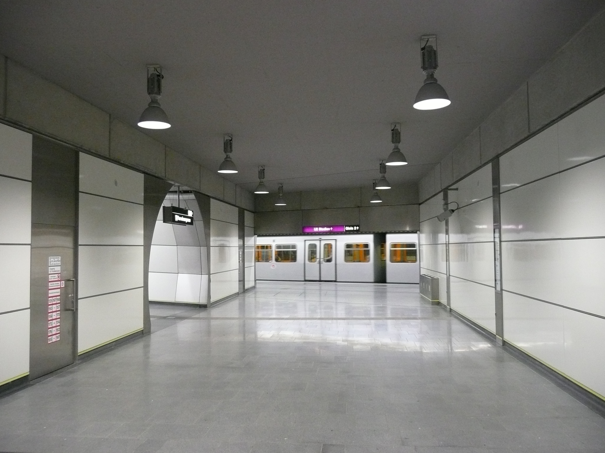 U2-Bahnhof Schottenring (Wien)